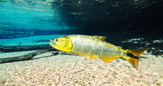 Salminus brasiliensis